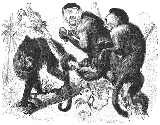 Faun-Aap (Cebus fatuellus) (Cebus apella fatuellus) en Kapucijner-Aap (Cebus capucinus).